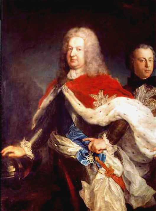 Stanisław Leszczyński (1677-1766) King of Poland